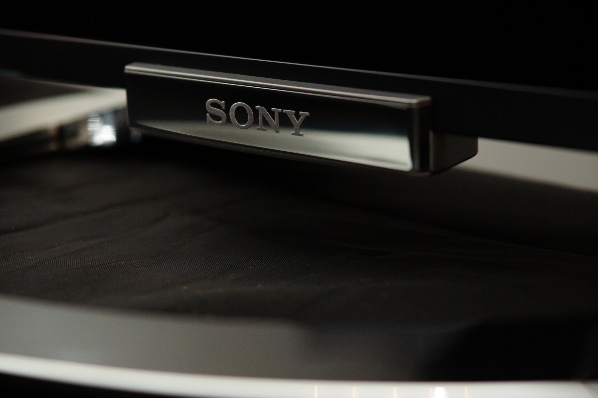 Bravia W905